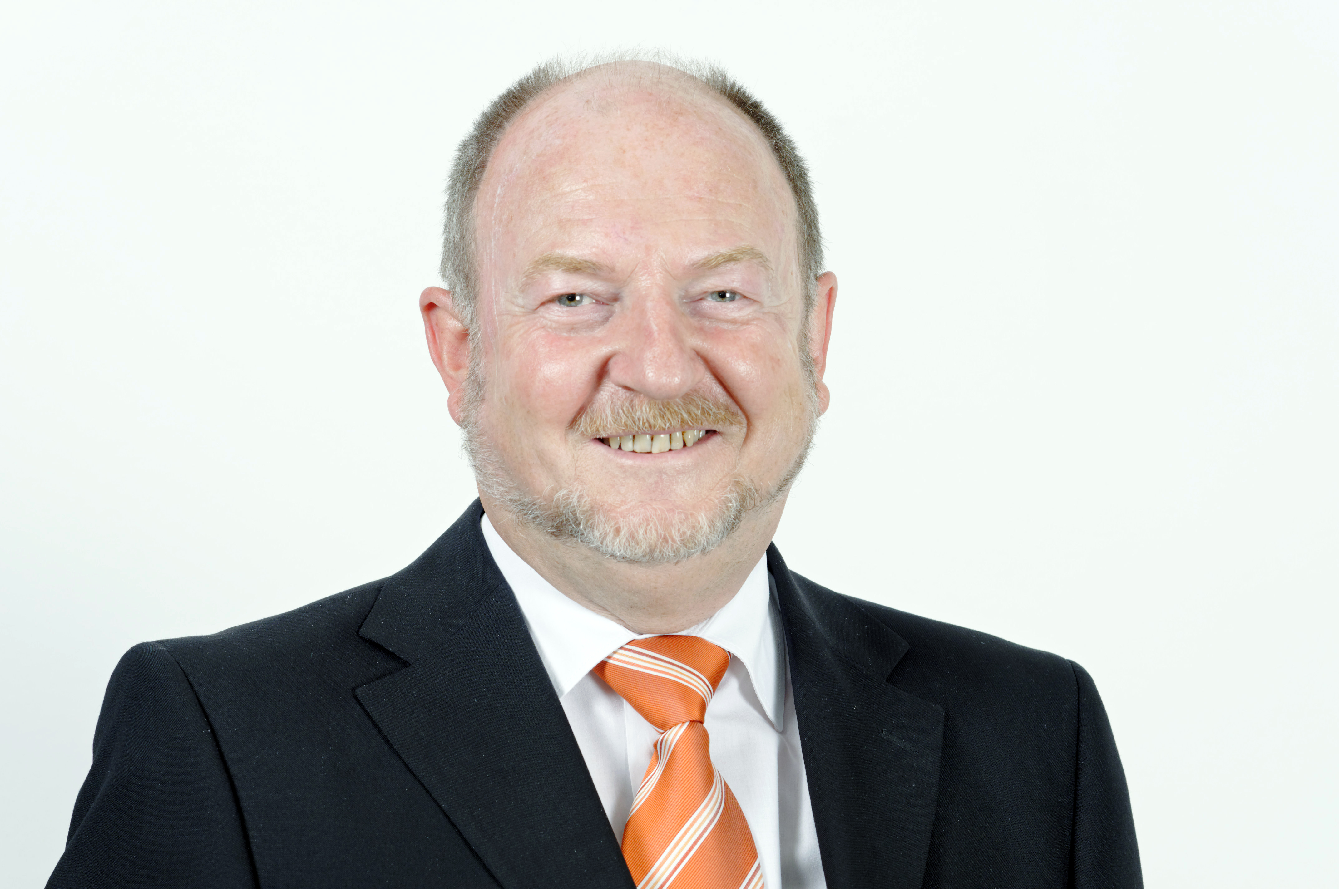 Manfred Scherer - Mitglied des Thüringer Landtages